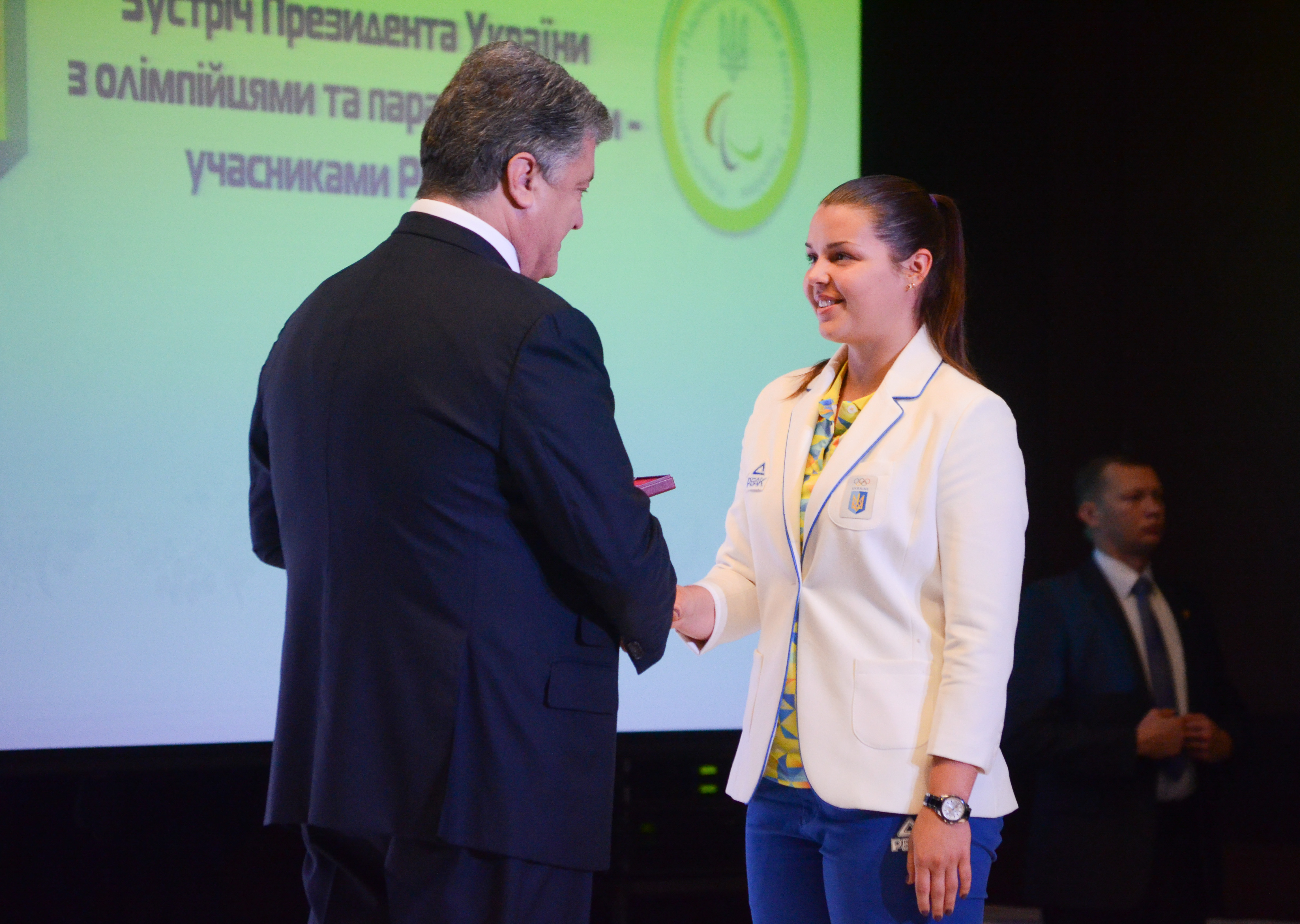 Зустріч Президента України з олімпійцями та паралімпійцями — учасниками Ріо-2016.